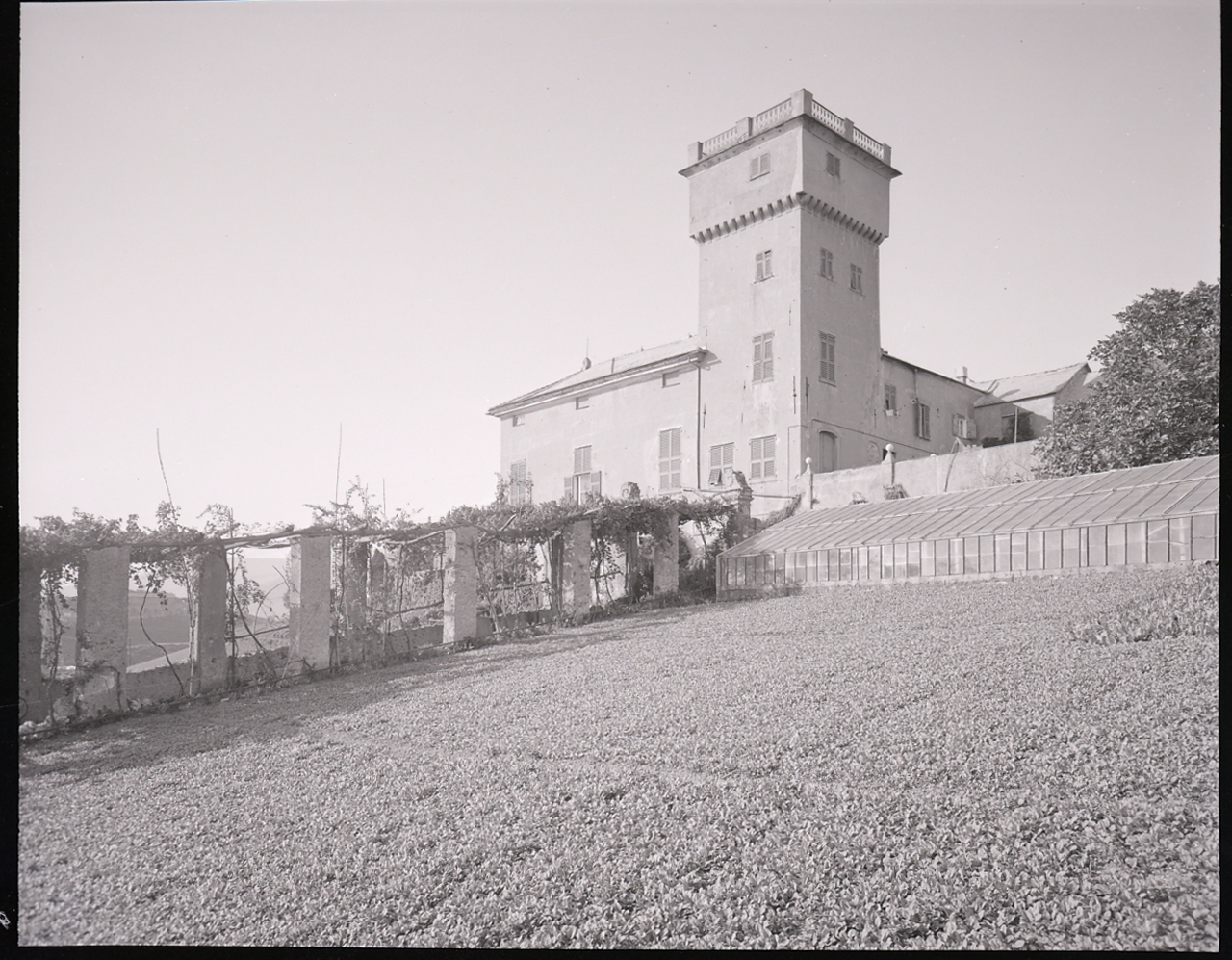 Servizio fotografico : Genova, 1963 / Paolo Monti. - Buste: 5, Fototipi: 5 : Negativo b/n, gelatina bromuro d'argento/ pellicola ; 10x12. - ((Serie costituita da 5 buste sciolte di negativi identificati con i nn.: 7511, 7512, 7513, 7514, 7515. - Il negativo identificato con il numero 46397 è stato realizzato per Zodiac. - Occasione: Documentazione per la pubblicazione: Italia Nostra (a cura di), "Le ville genovesi", catalogo della mostra, Genova 1962, Genova, Comune di Genova, 1967. - Fonte: Monografia di Italia Nostra (a cura di): Le ville genovesi, catalogo della mostra, Genova 1962, Genova, Comune di Genova (1967). - Fonte: Lettera di Paolo Monti: I. Carteggi/ Genova - Enrico (1963-1966), presso Archivio Paolo Monti. Camicia con documenti dattiloscritti e manoscritti vari relativi al lavoro eseguito per Italia Nostra: preventivi, lettere, inventari. - Fonte: Rubrica di Paolo Monti: Archivio fino 1-4-1961/ 31-3-1963 (1961-1963), presso Archivio Paolo Monti. - Fonte: Agenda di Paolo Monti: R 1 - Monti/ 1 aprile 1963 - 6 giugno 1964/ 6000-8193 (1963-1964), presso Archivio Paolo Monti